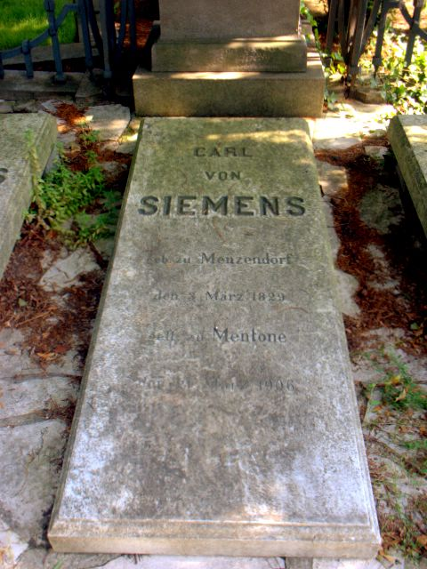 Grabstätte von Carl von Siemens auf dem Südwestkirchhof Stahnsdorf Quelle: Selbst fotografiert Fotograf: Matthias Alfa Datum:08.09.2005